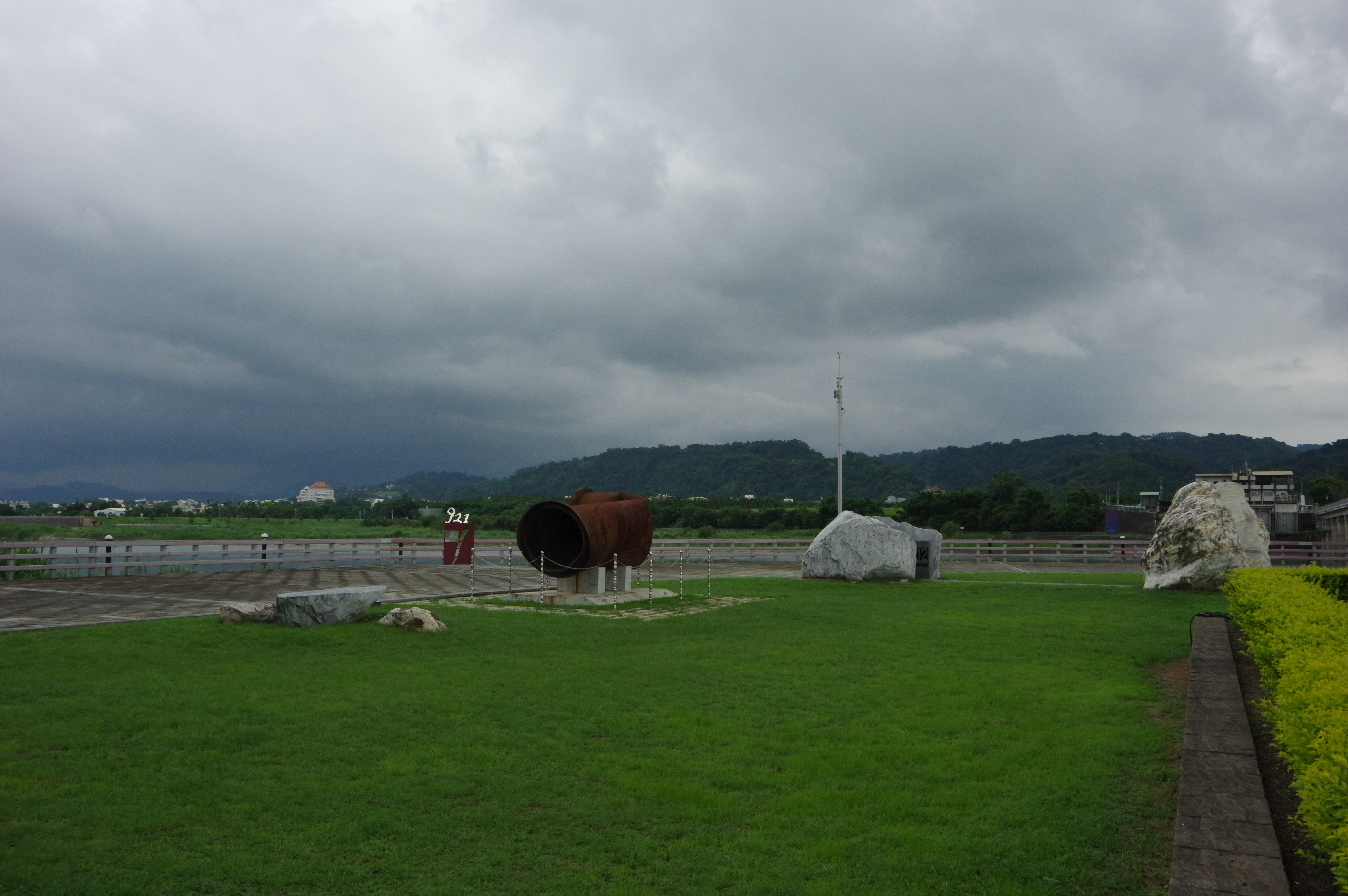 位於台中市石岡區石岡壩旁的921地震公園